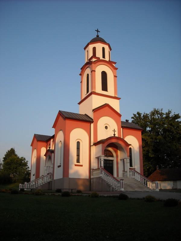 Hram Sv. Trojice, Piskavica